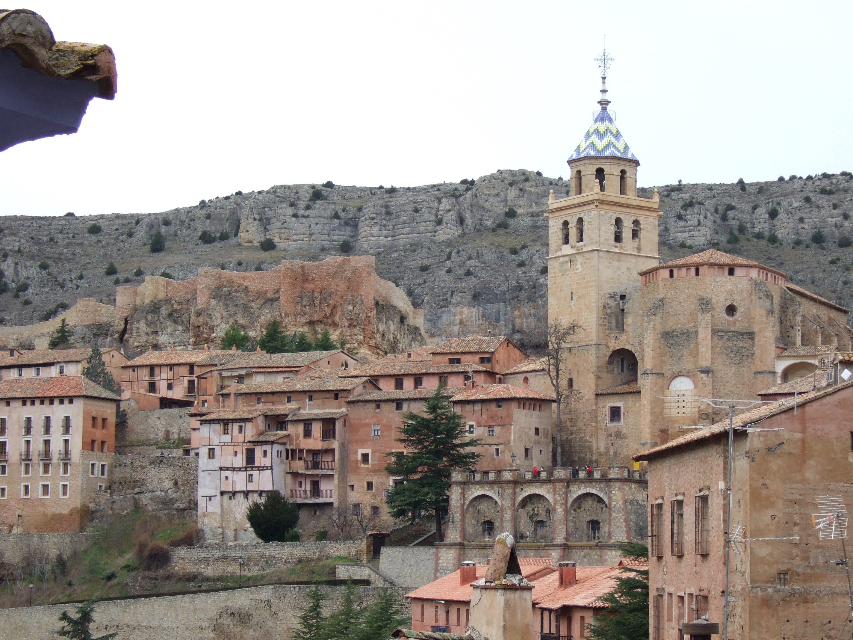 Albarracín - Vista con castillo a la izquierda y catedral a la derecha